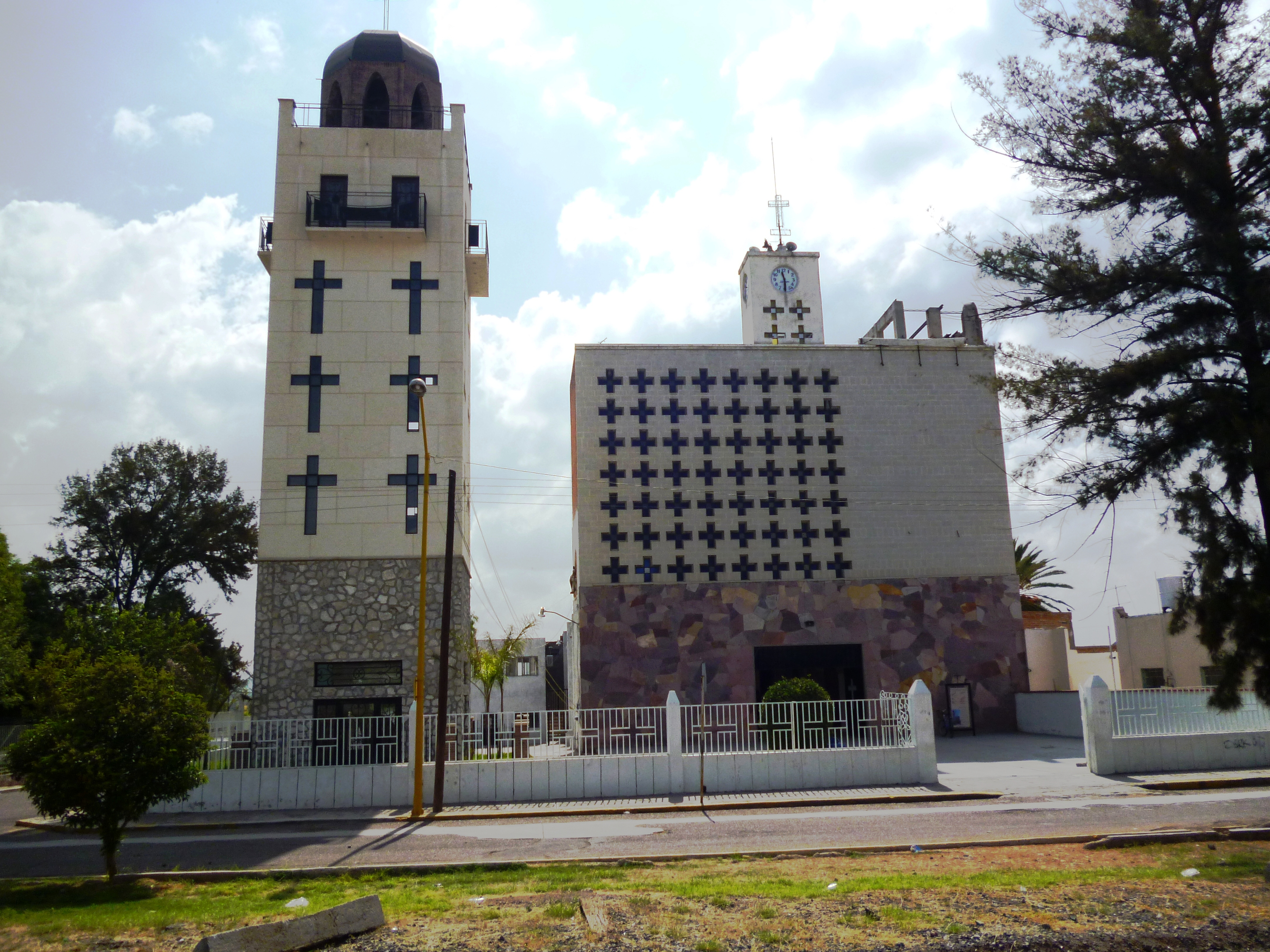 Parroquia de Nuestra Señora de Guadalupe en Pabellón de Arteaga